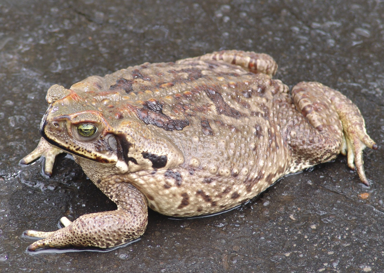 Sapo - Avaré - São Paulo, Brasil